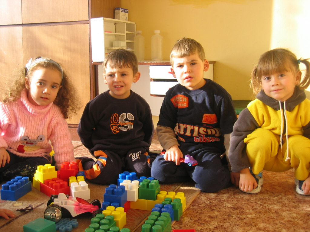 ОДЗ Здравец